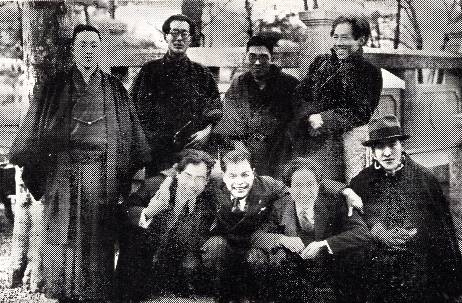 昭和10年代前半撮影（推定）。転向後の榊原金之助ほか。